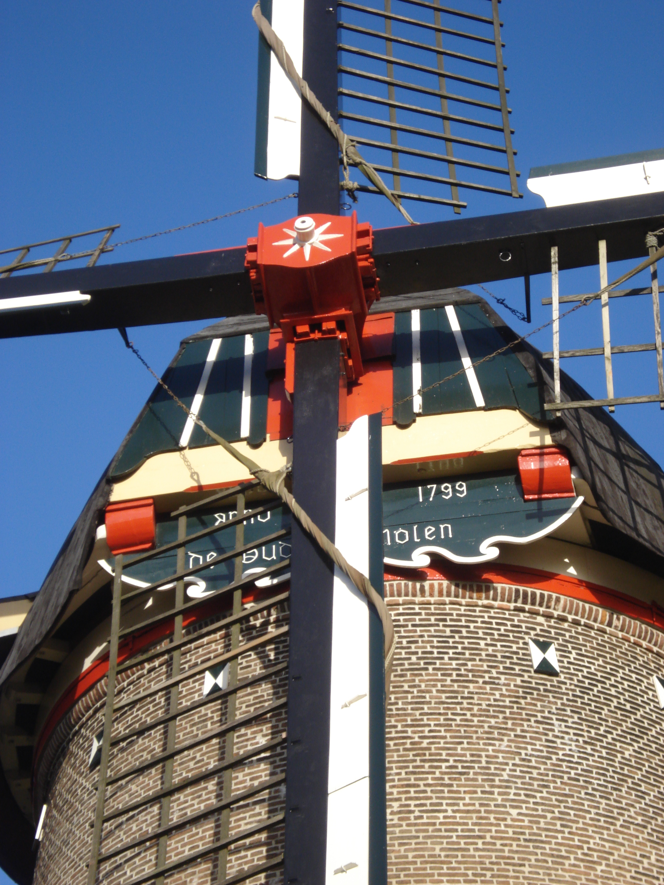 Detail of De Oude Molen, Wijchen, Gelderland, NL